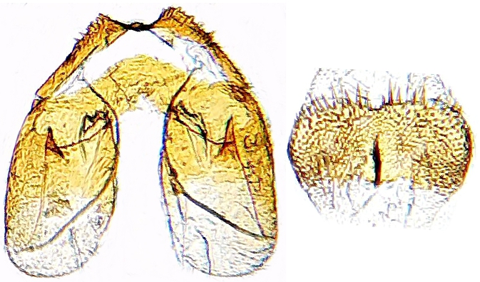 Cyphon coarctatus von Baden-Württemberg, zwischen Rottweil und Tuttlingen, 700 m hoch, an Fensterscheibe nähe Gartenteich gefunden am 7. Juli 2014, Prehensor